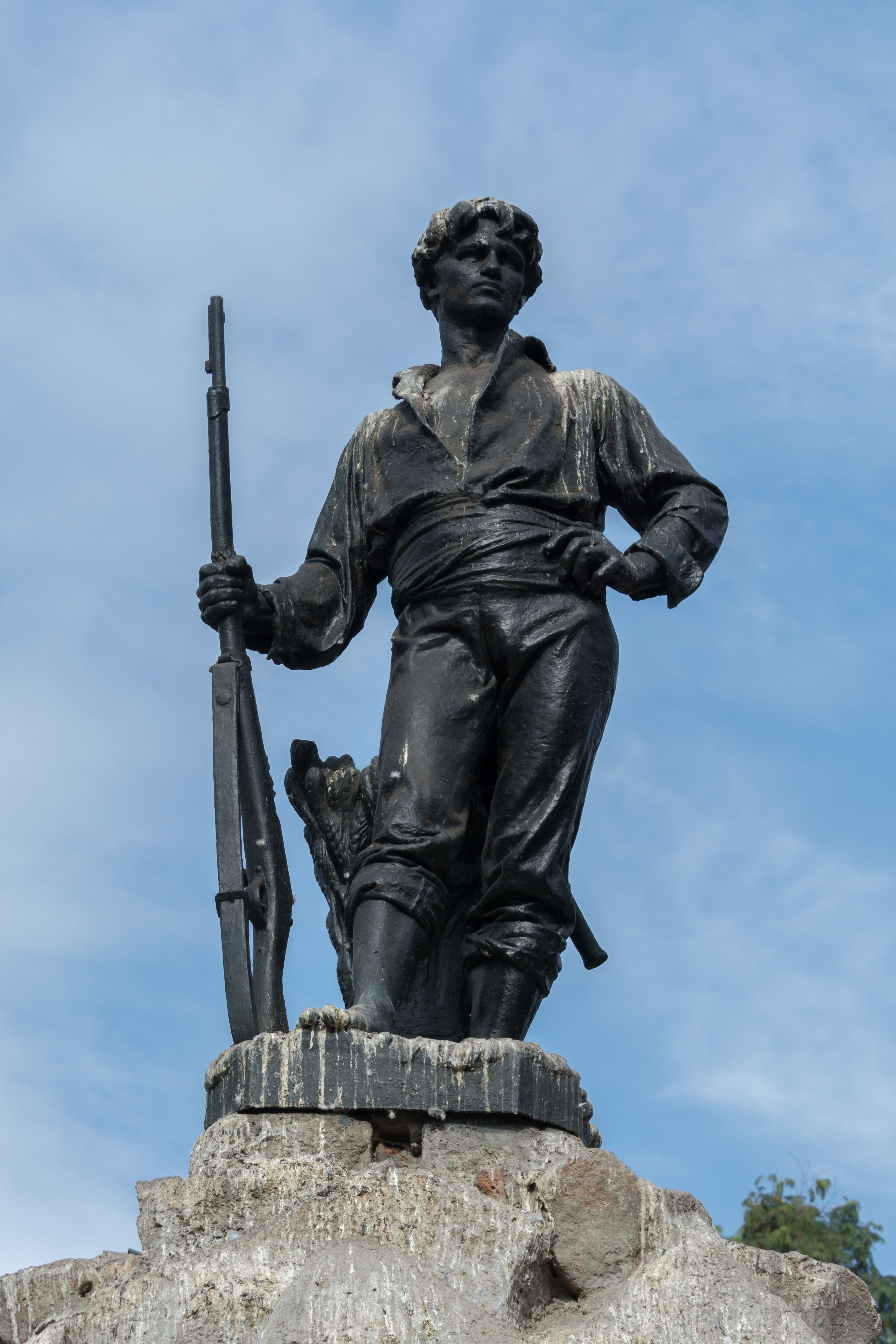 Día del Patrimonio 2019, Barrio Yungay, Santiago, Chile.